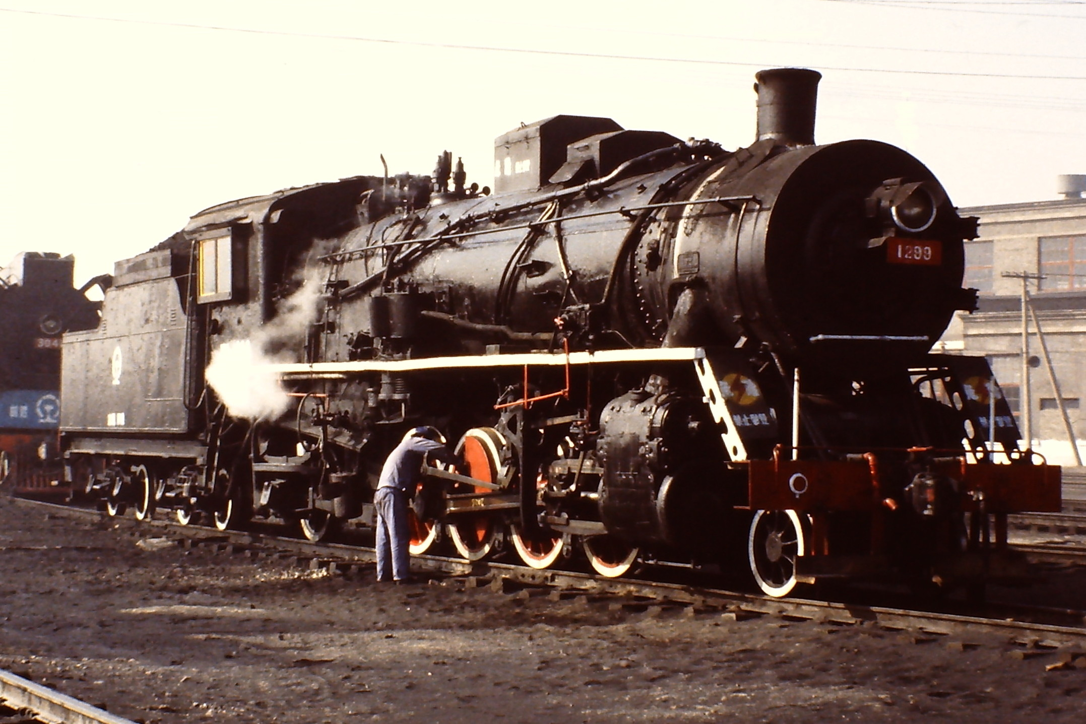 CNR JF1-1299 im Betriebswerk von Harbin